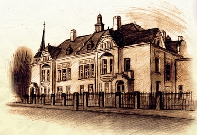 Ch. Frenkelio vila